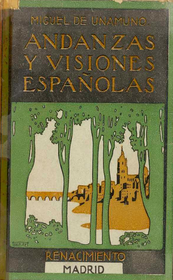 Andanzas y visiones españolas.